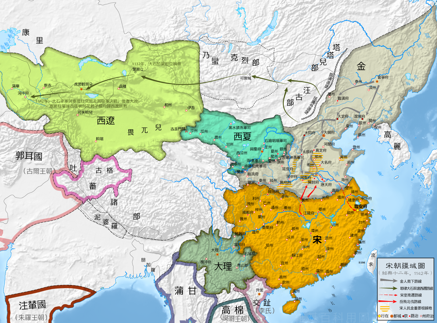 南宋疆域图